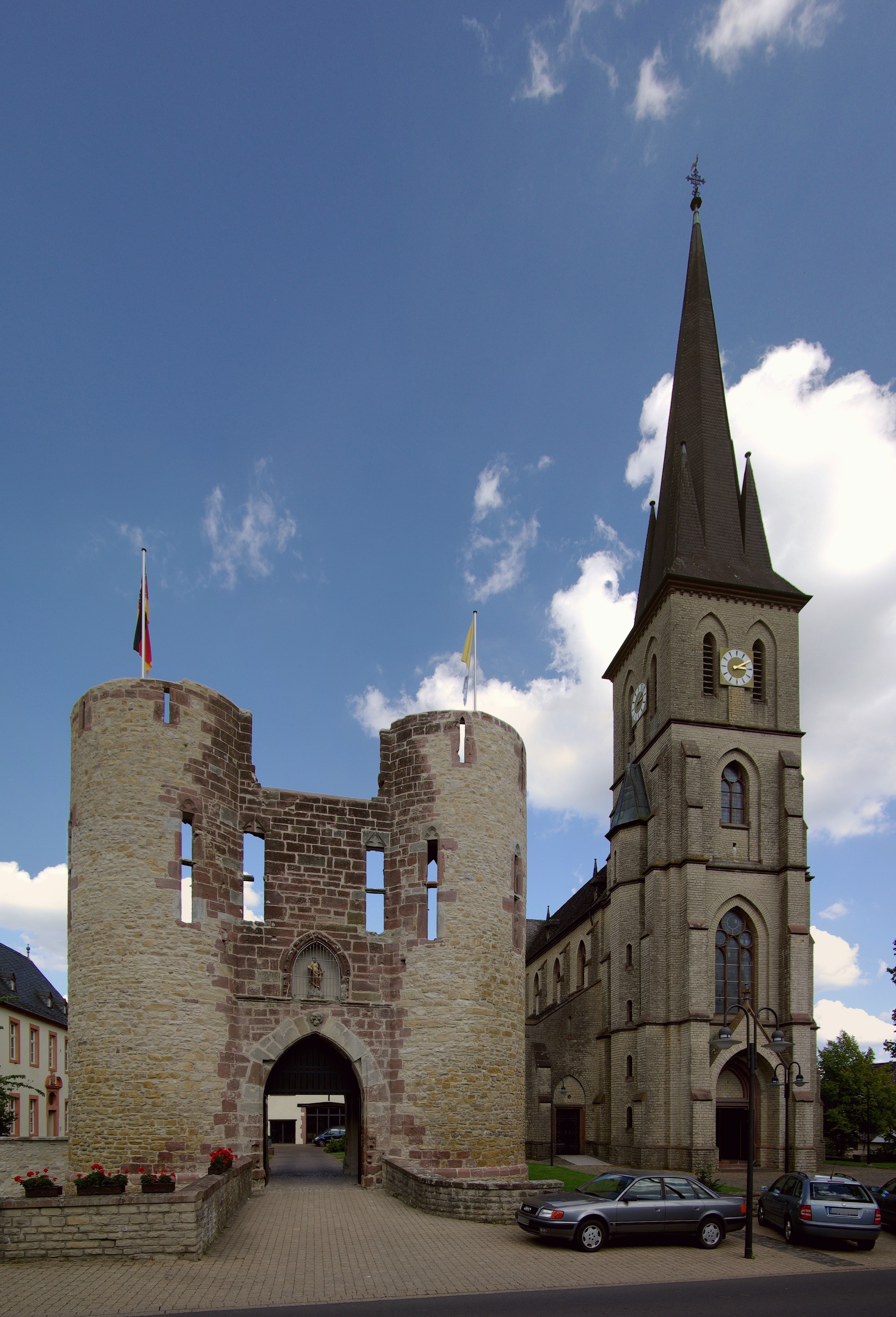 Welschbillig, gotischer Torbau, Grabenbrücke und Graben der ehemaligen erzbischöflichen Wasserburg, 13. Jahrhundert, 1673 zerstört, dahinter die Katholische Pfarrkirche St. Peter; neugotische dreischiffige Basilika, 1887–90, Architekt Reinhold Wirtz, Trier